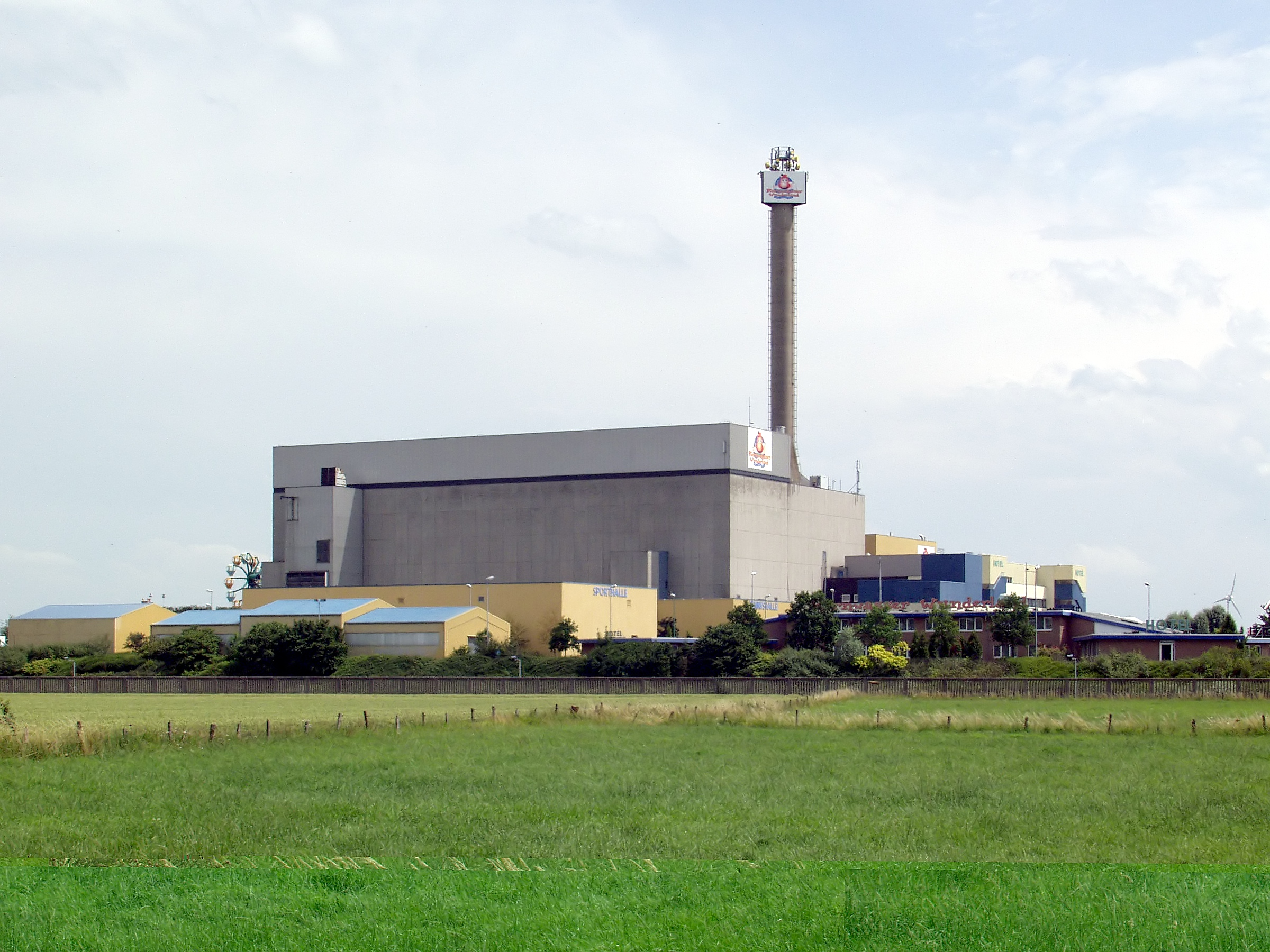 Kernwasser-Wunderland, ehemals Schneller Brüter Kalkar.